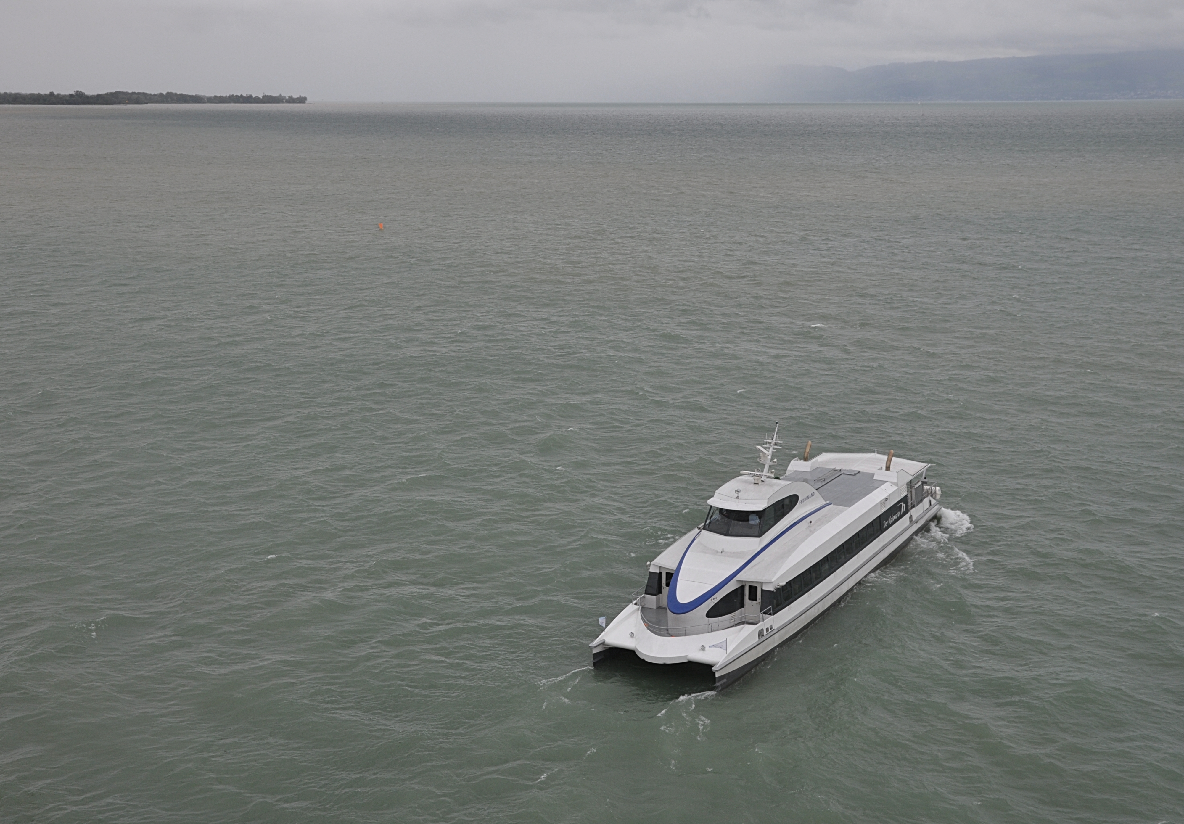 Katamaran Ferdinand verläßt rückwärts den Fährhafen FN